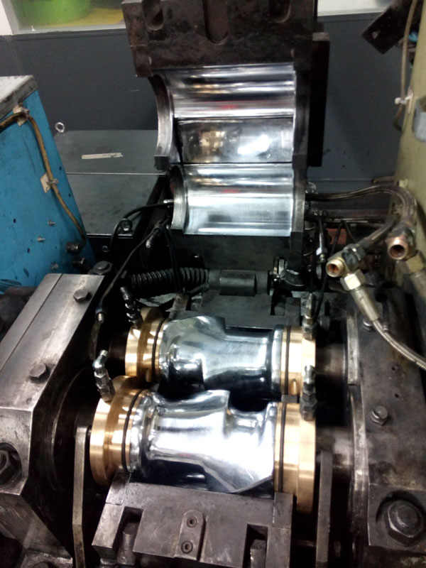 Stempelkneter - Blick in geöffnete Mischkammer